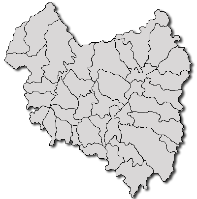 Categorie:Hărţi ale judeţului Covasna